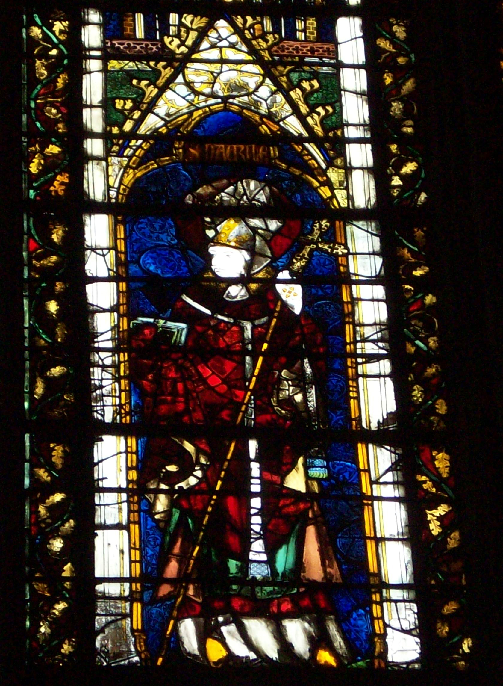 Vitrage de Maurille de Rouen.